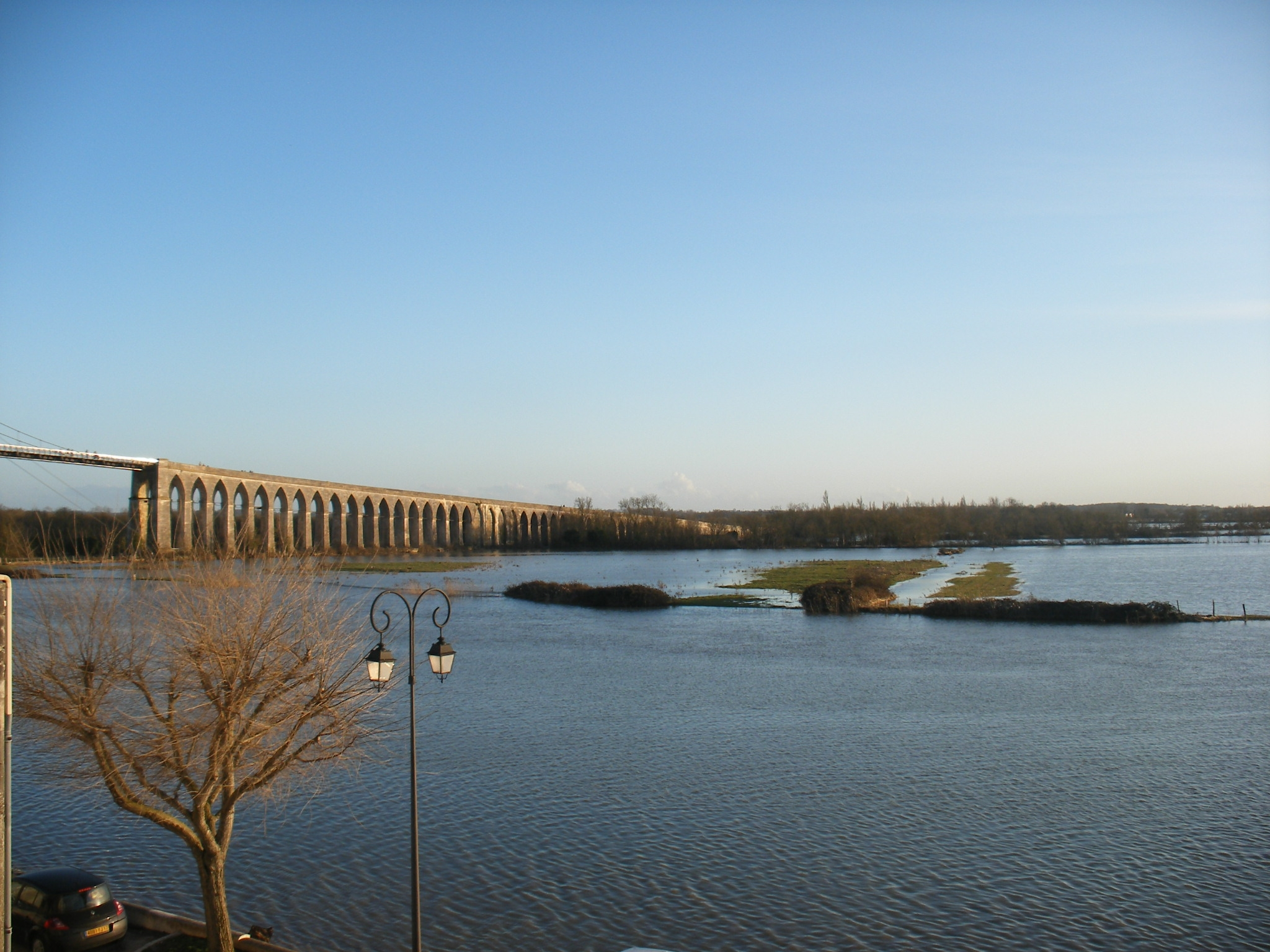 La Charente en crue déborde complètement sur la rive gauche dans les prairies situées face à Tonnay-Charente (17). Crue exceptionnelle le lendemain de la tempête Xynthia à Tonnay-Charente.